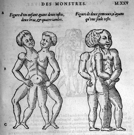 Ambroise Paré (1510?-1590): Les oeuvres d’Ambroise Paré, 1585.